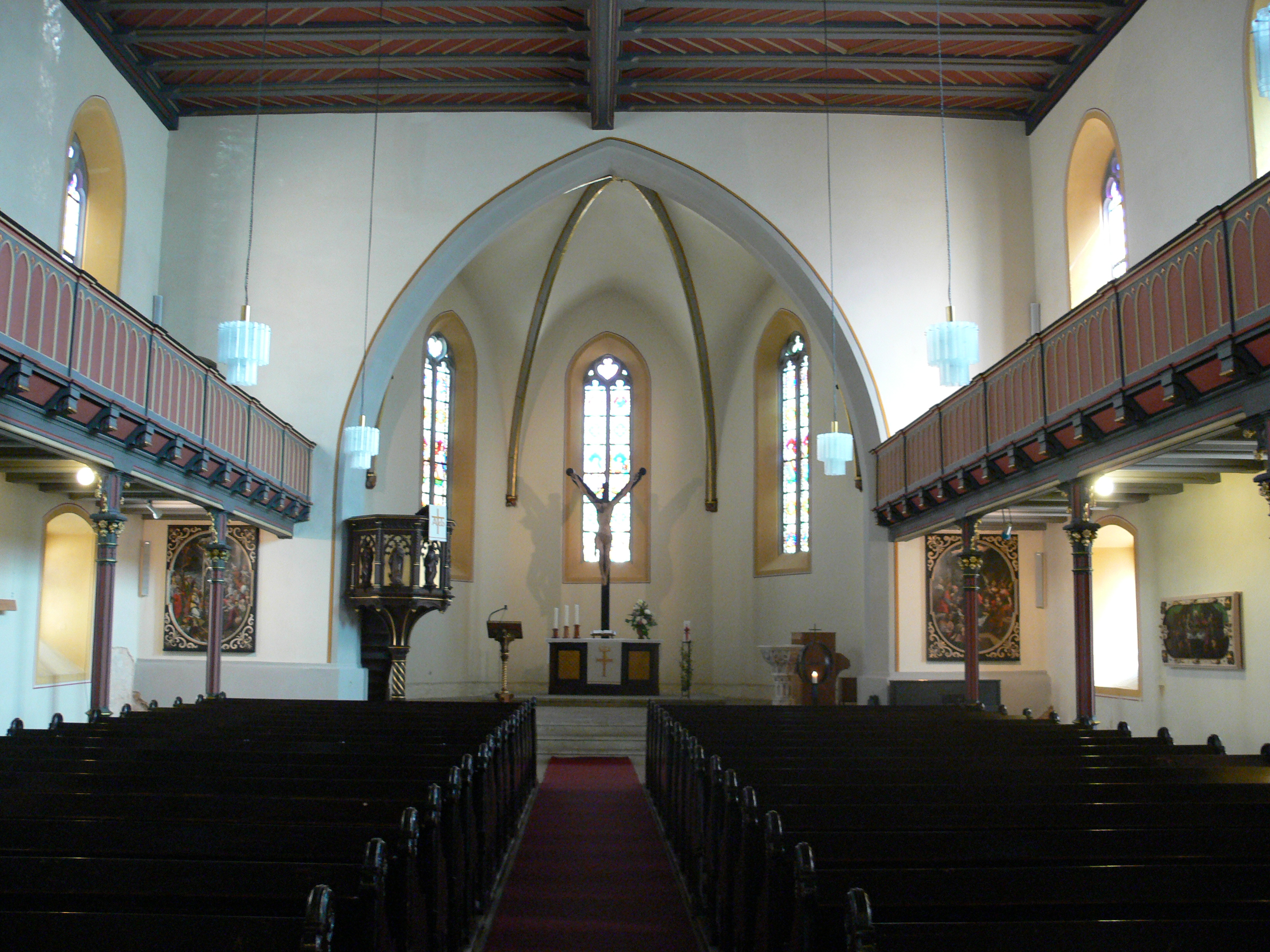 Eisenberg (Thüringen), Stadtkirche St. Peter